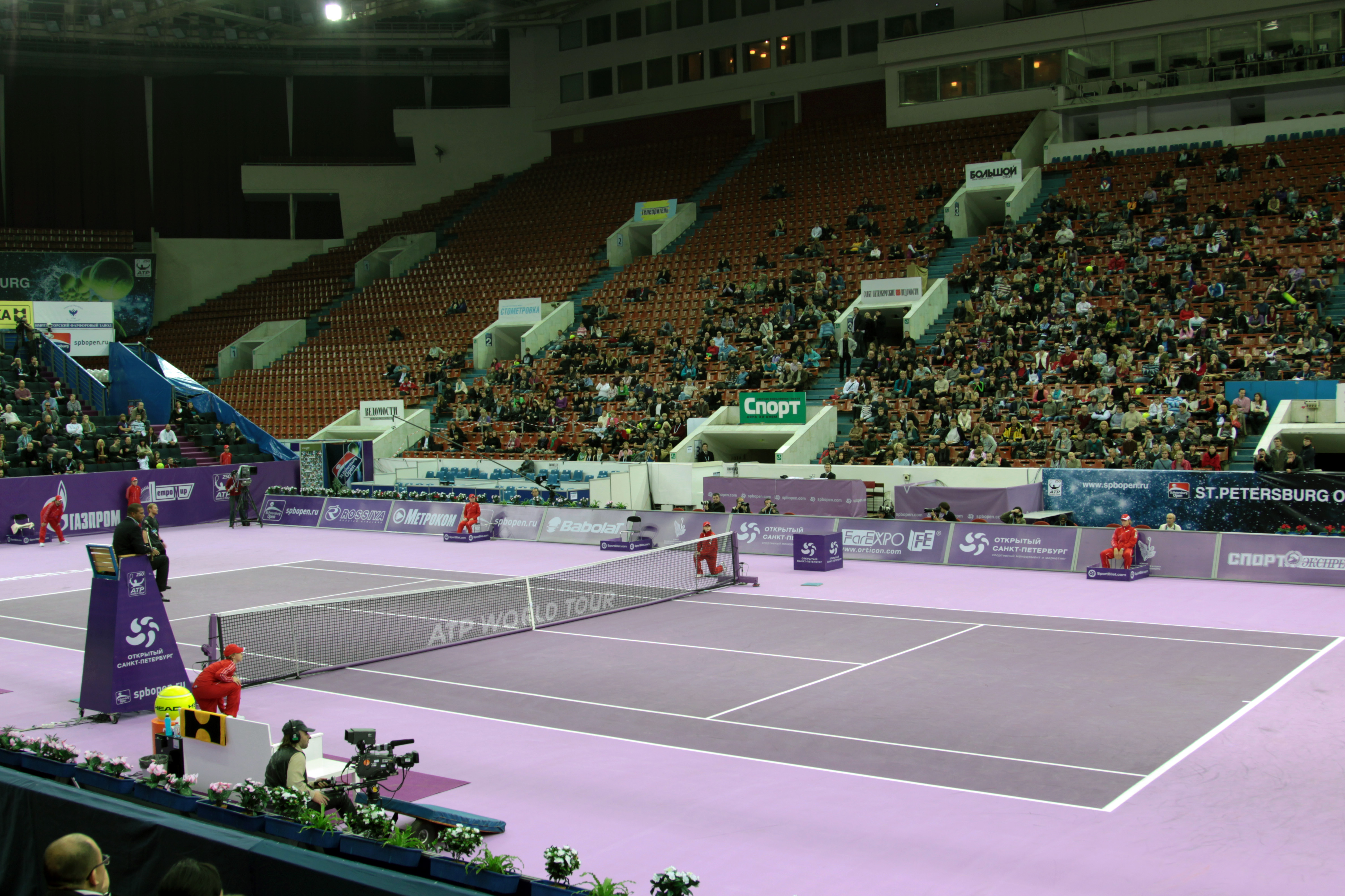 SpbOpen 2010